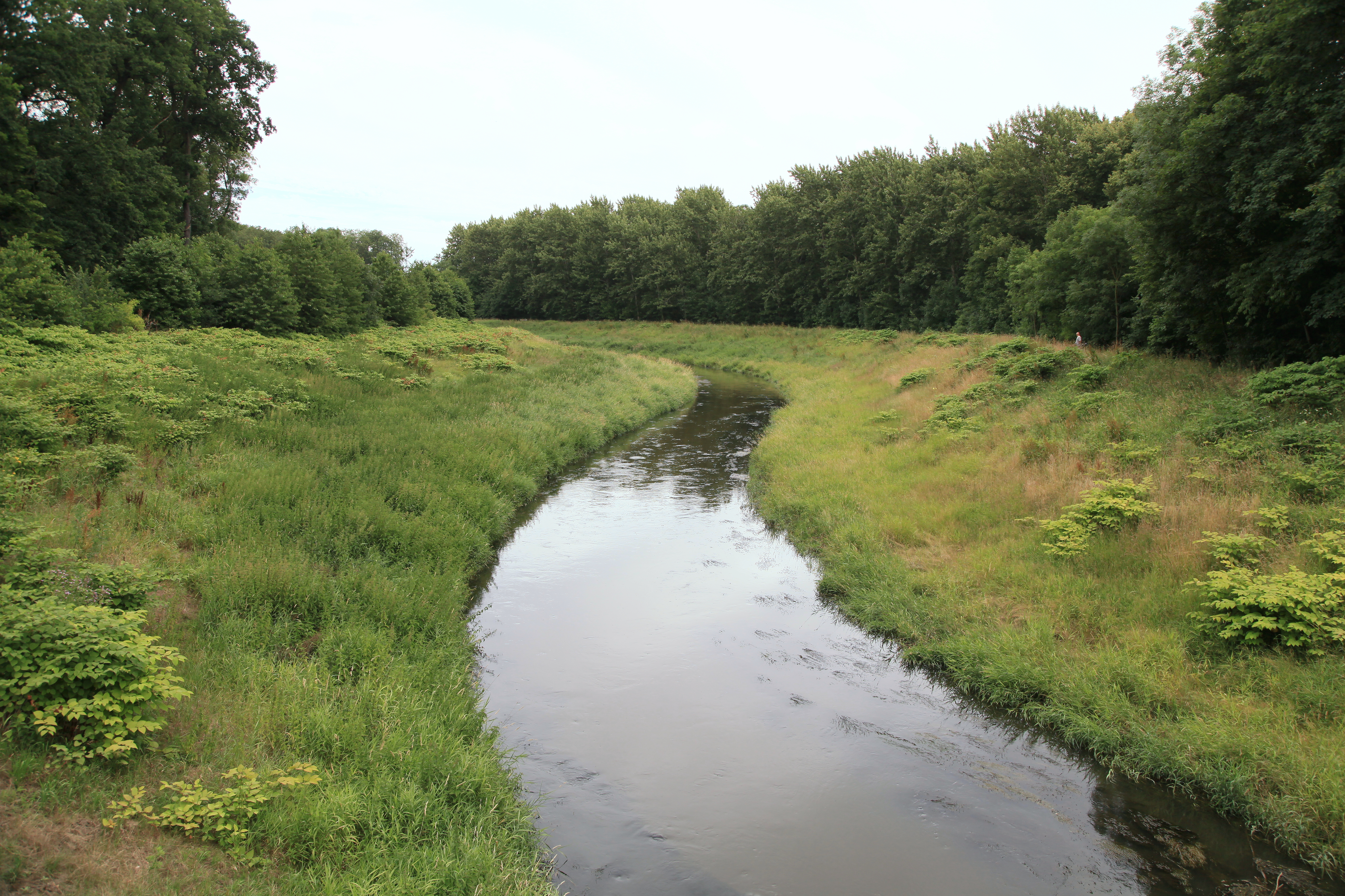 Die Nahle vor dem NSG Burgaue in Leipzig